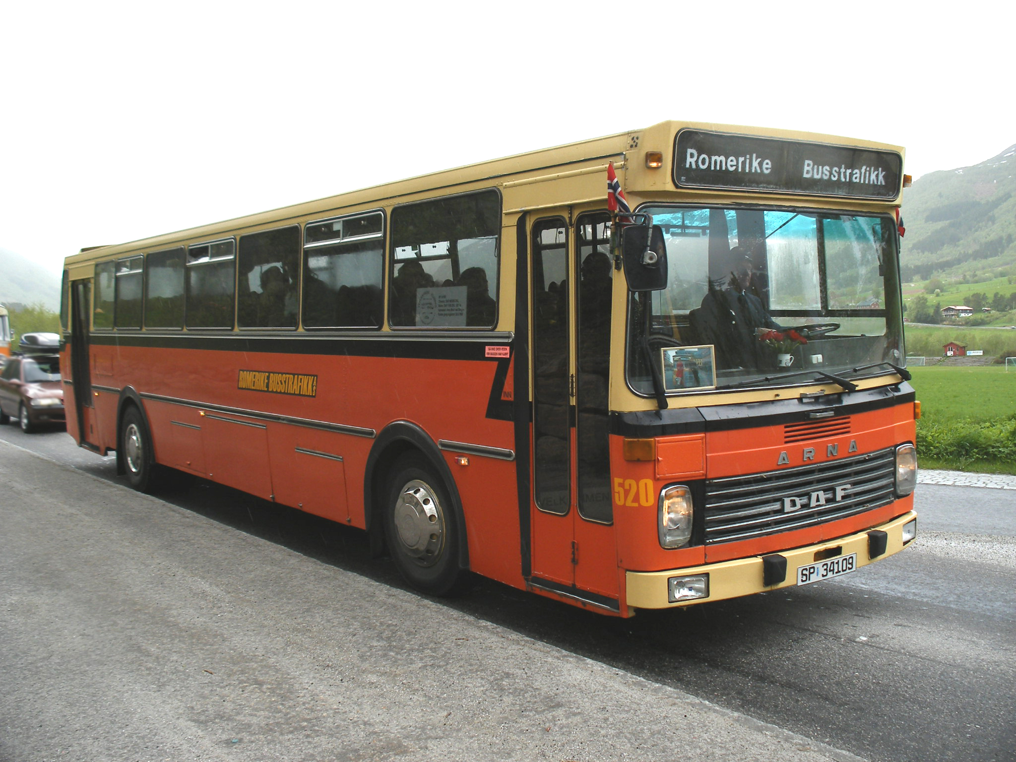 Old bus from Norway. Arna DAF MB200. Romerrike busstrafikk.